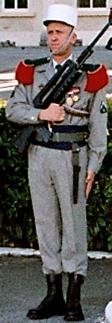 Legione straniera, il brigadier chef Danilo Pagliaro effettivo della Legione straniera.